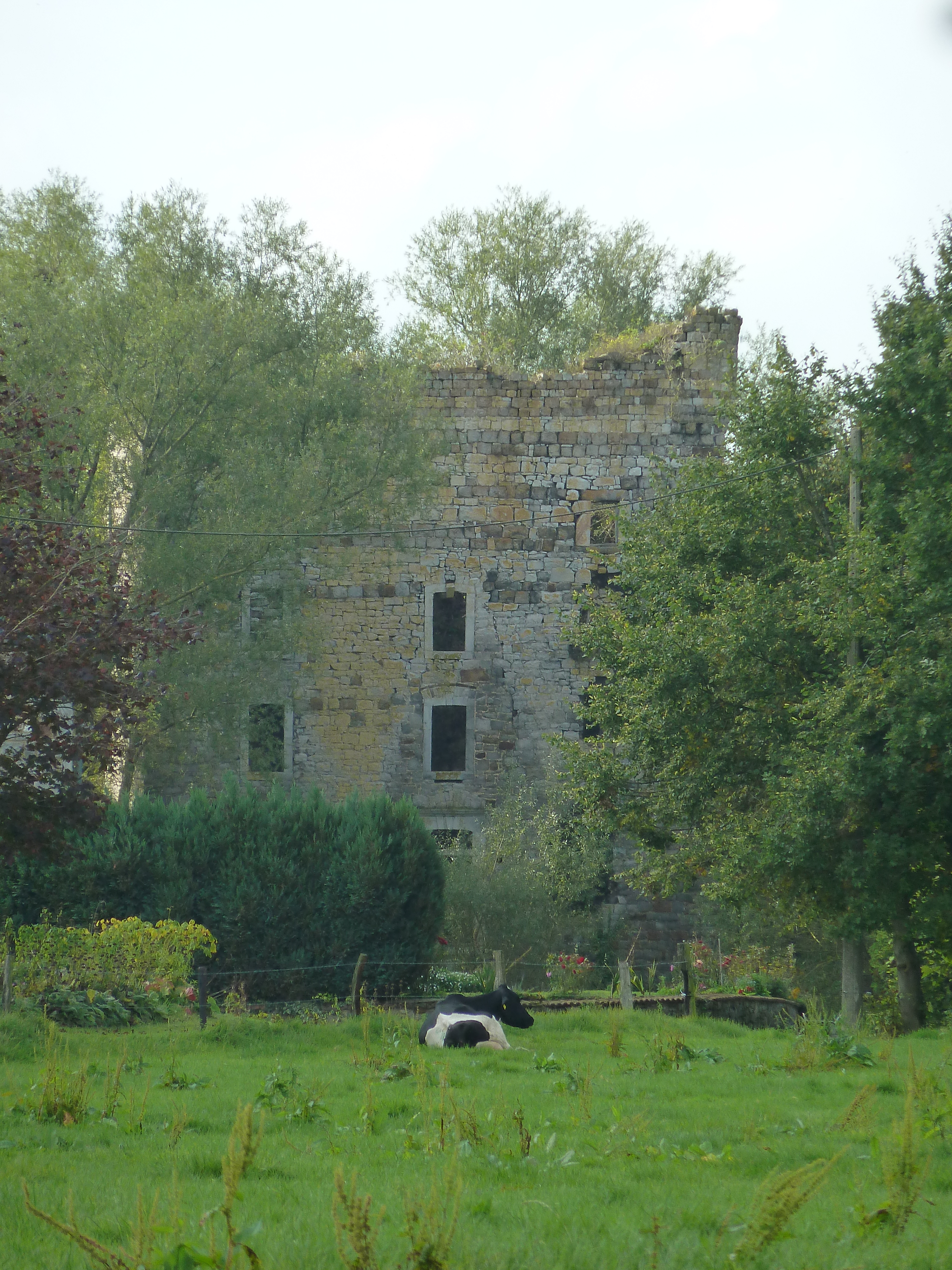 Burg Raaff, Berlotte, Raeren, België